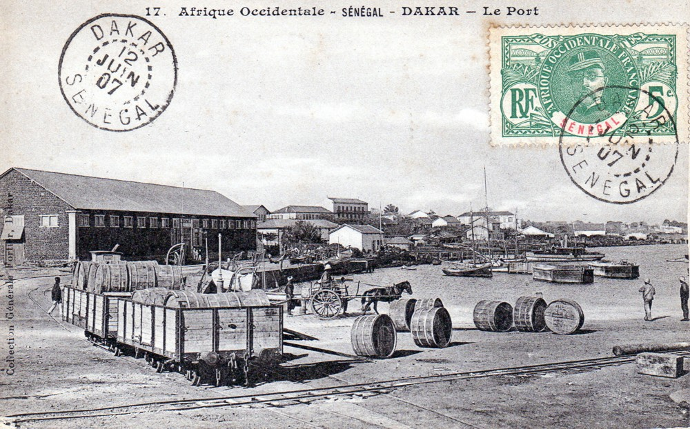 Le port et la gare primitive de Dakar